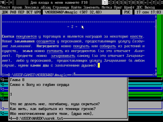 Скриншот программы Лексикон 1.4